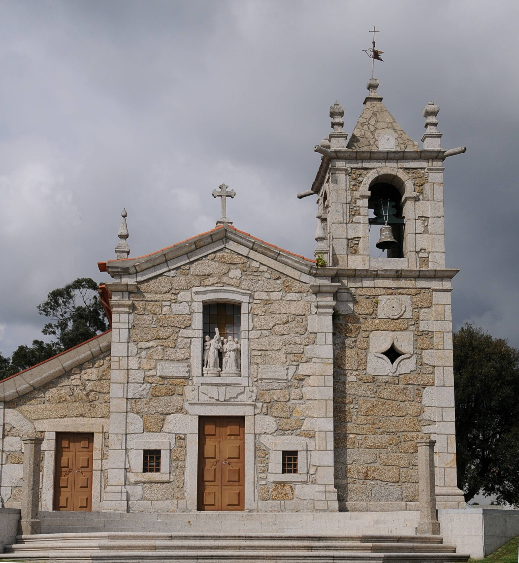 Senhora do Parto Chapel, in Aveleda, Braga, Portugal